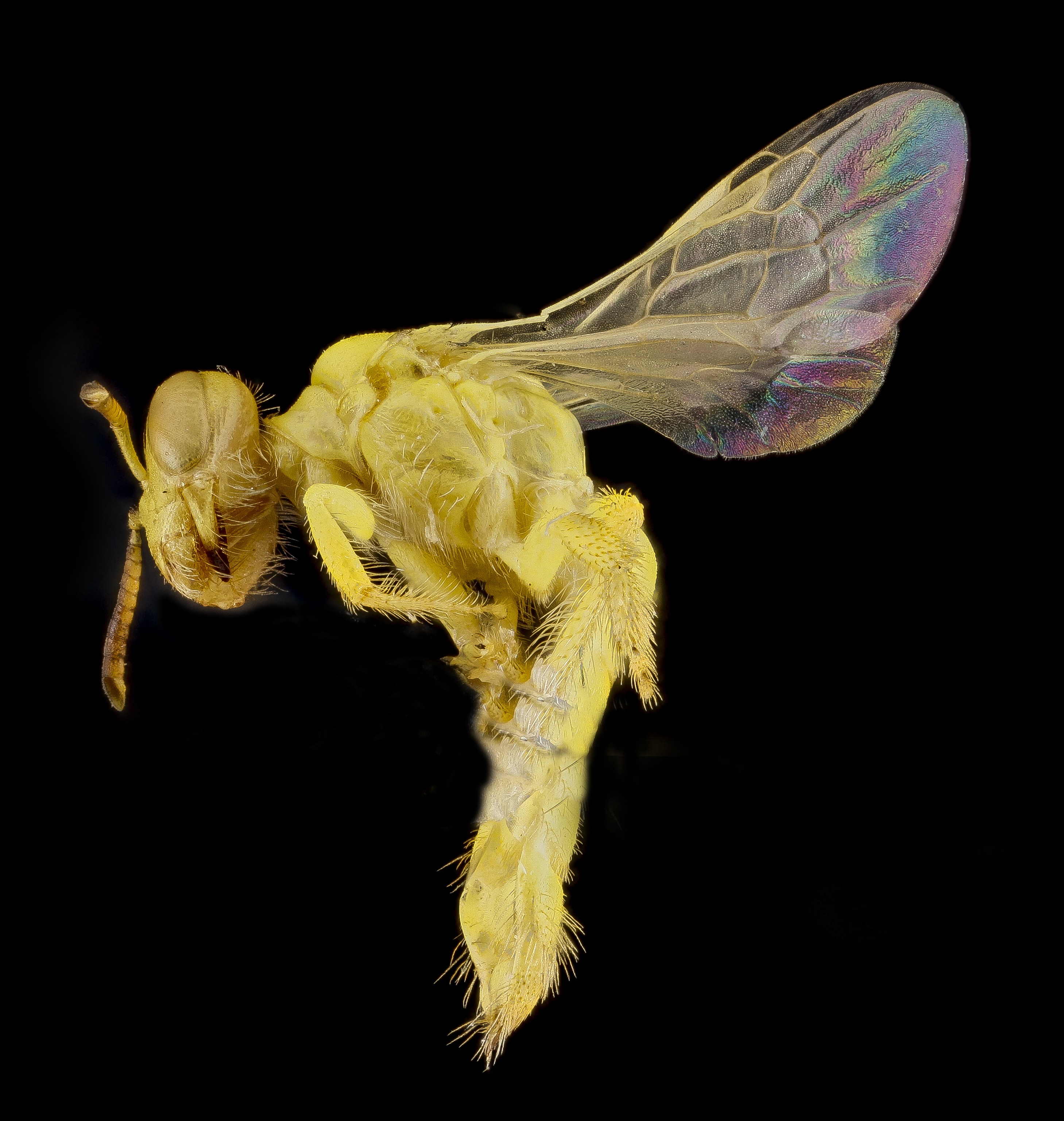 Perdita luteola, Arizona, Petrified Forest National Park